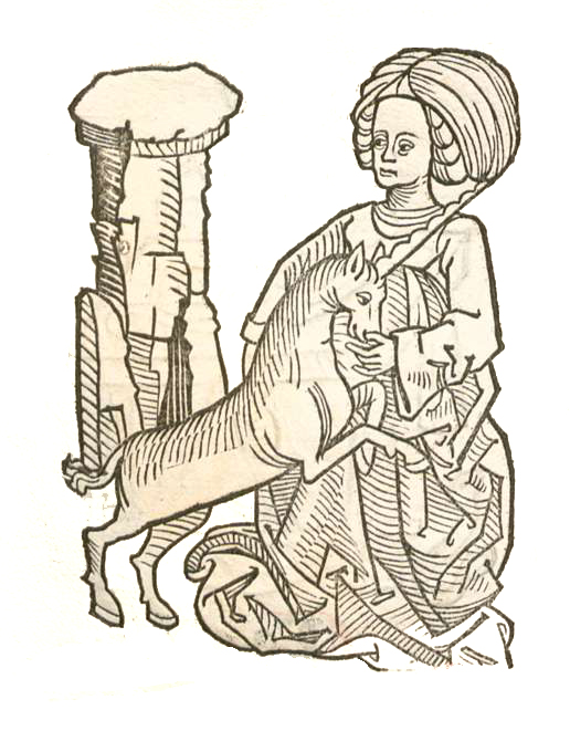 Abbildung zum Kapitel Unicornus - Einhorn